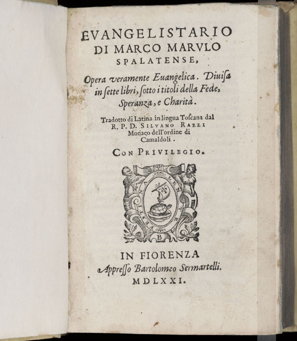 Evangelistarium, jedno od latinskih djela pisca Marka Marulića.